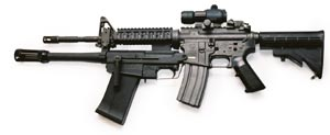 M4 + XM26 LSS